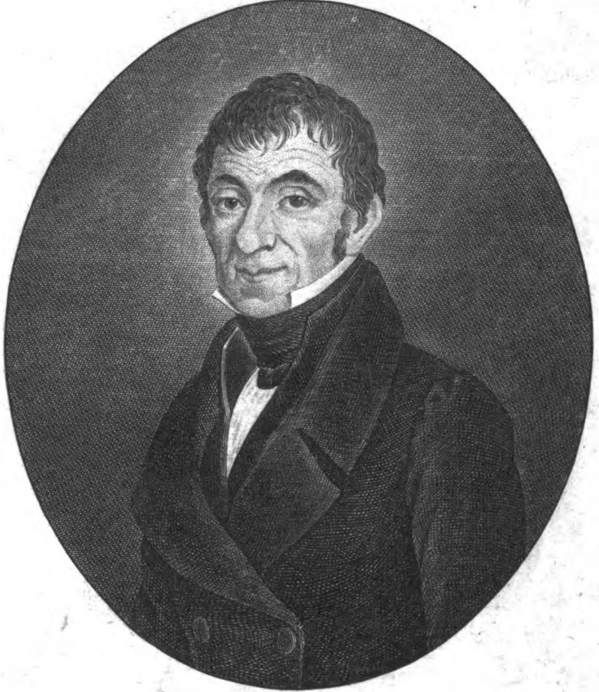 Salomon Jacob Cohen (1772–1845), deutscher Hebraist, Lehrer und Übersetzer; Vertreter der Haskala